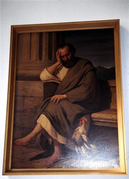 Sundby Kirke i Danmark. Maleri af Andreas Herman Hunæus